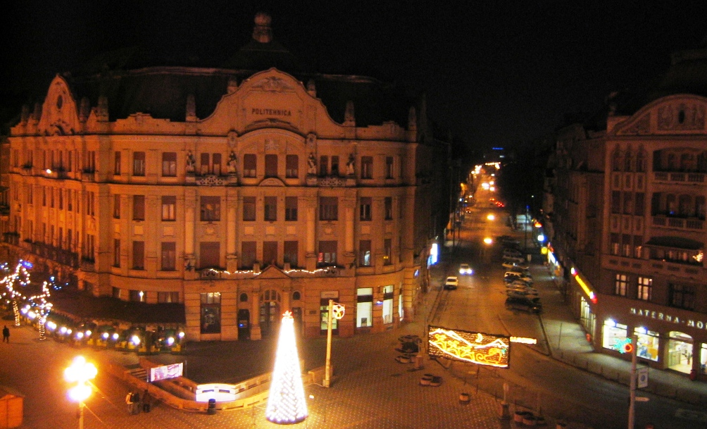 Palatul Lloyd, sediul Politehnicii din Timisoara; Vedere de la balconul operei